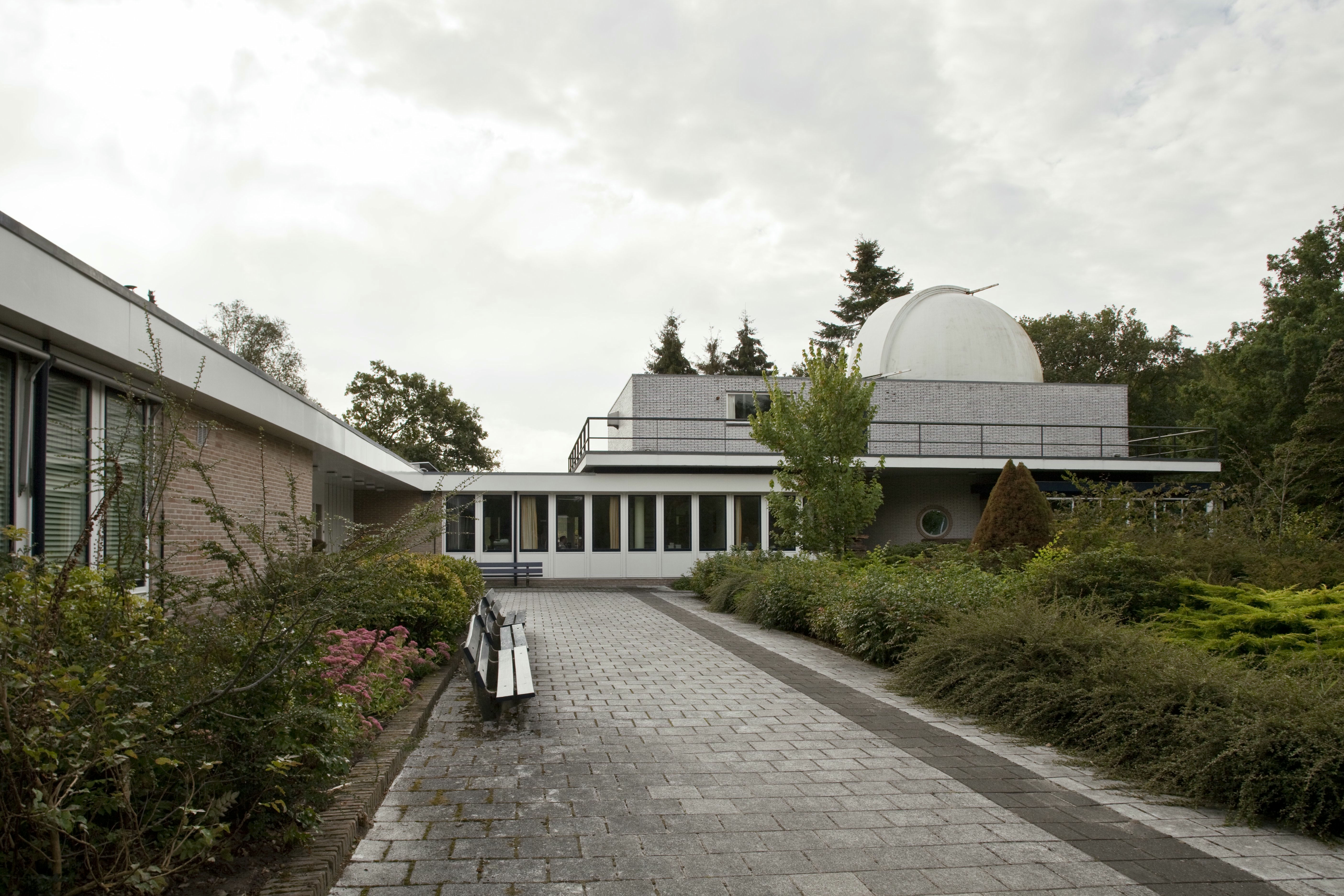 Voormalige Kapteyn Sterrenwacht: Zicht op zijgevel van hoofdgebouw met observatiekoepel (opmerking: Let op: bij aanvraag voor publicatie niet alleen toestemming RCE vereist maar ook van Sterrenwacht!)